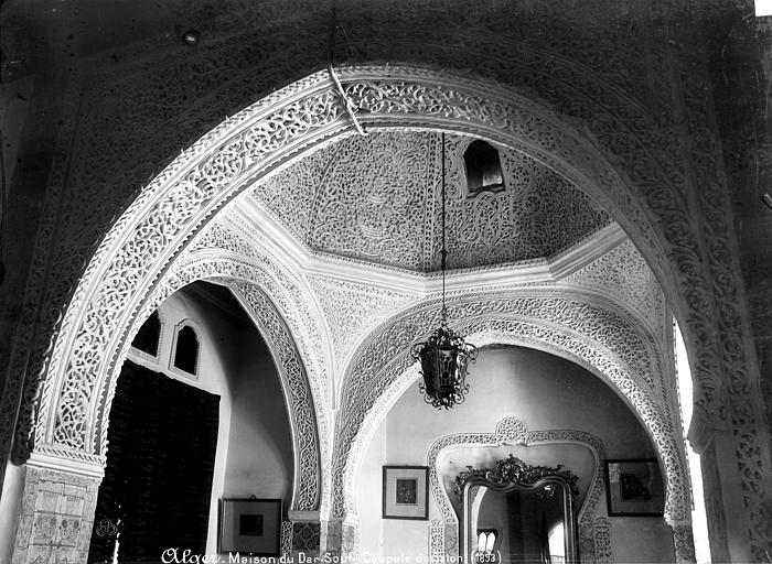 Vue de la coupole de la maison du Dar-Souf à Alger, Algérie. Photographie de Séraphin-Médéric Mieusement.